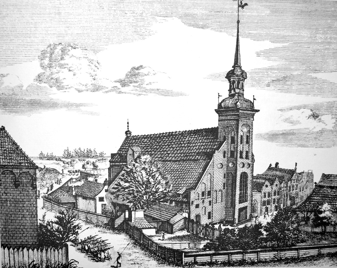 Gdańsk Stare Miasto, kościół św. Jakuba. Na pierwszym planie obecnie przebiega ul. Wałowa.